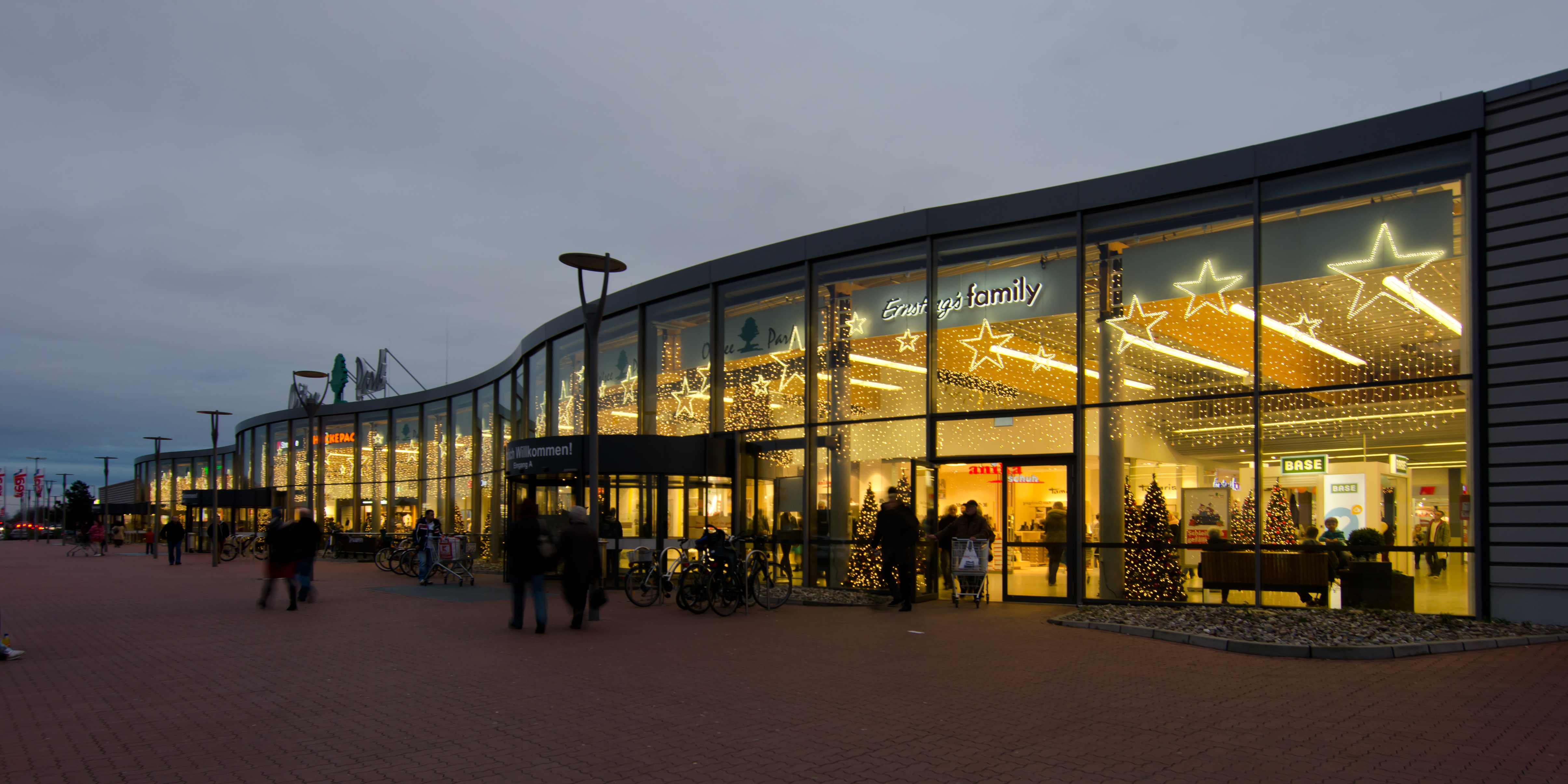 Ostseepark in Sievershagen/Rostock im Dezember